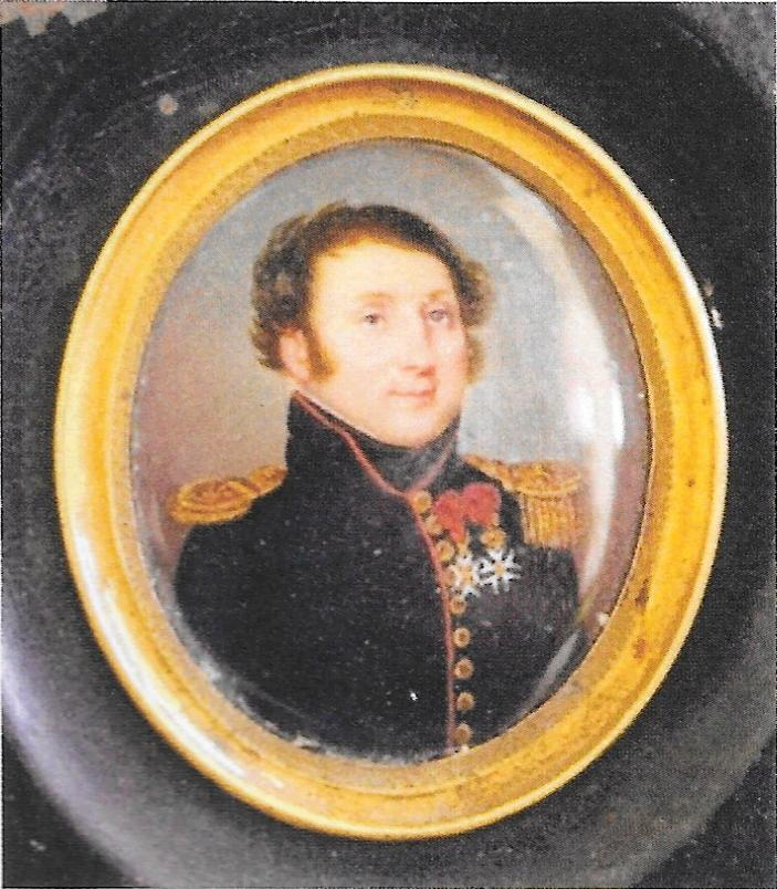 Jean Louis SARRAND